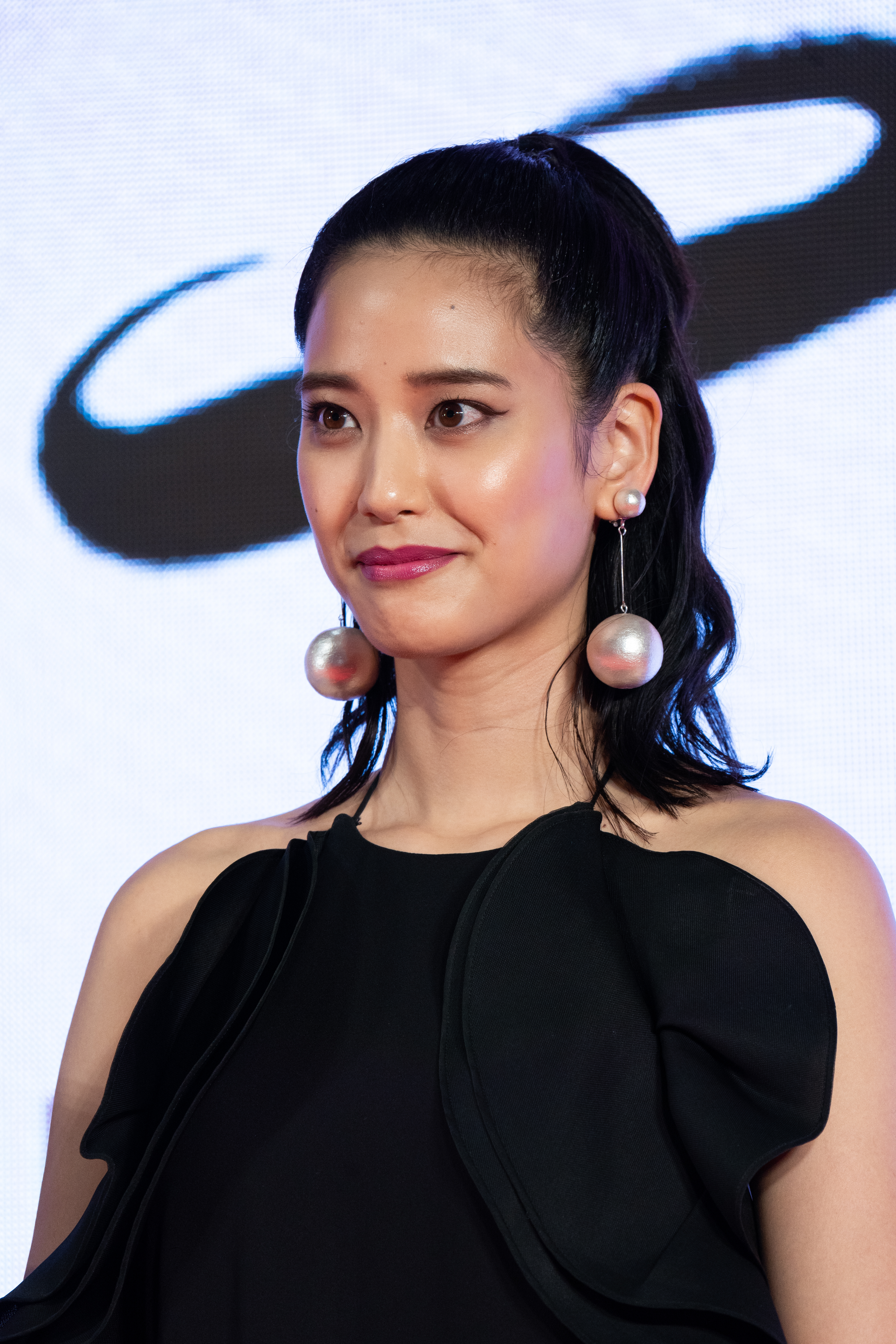 第32回 東京国際映画祭 オープニングセレモニー 山崎紘菜 (海辺の映画館―キネマの玉手箱)